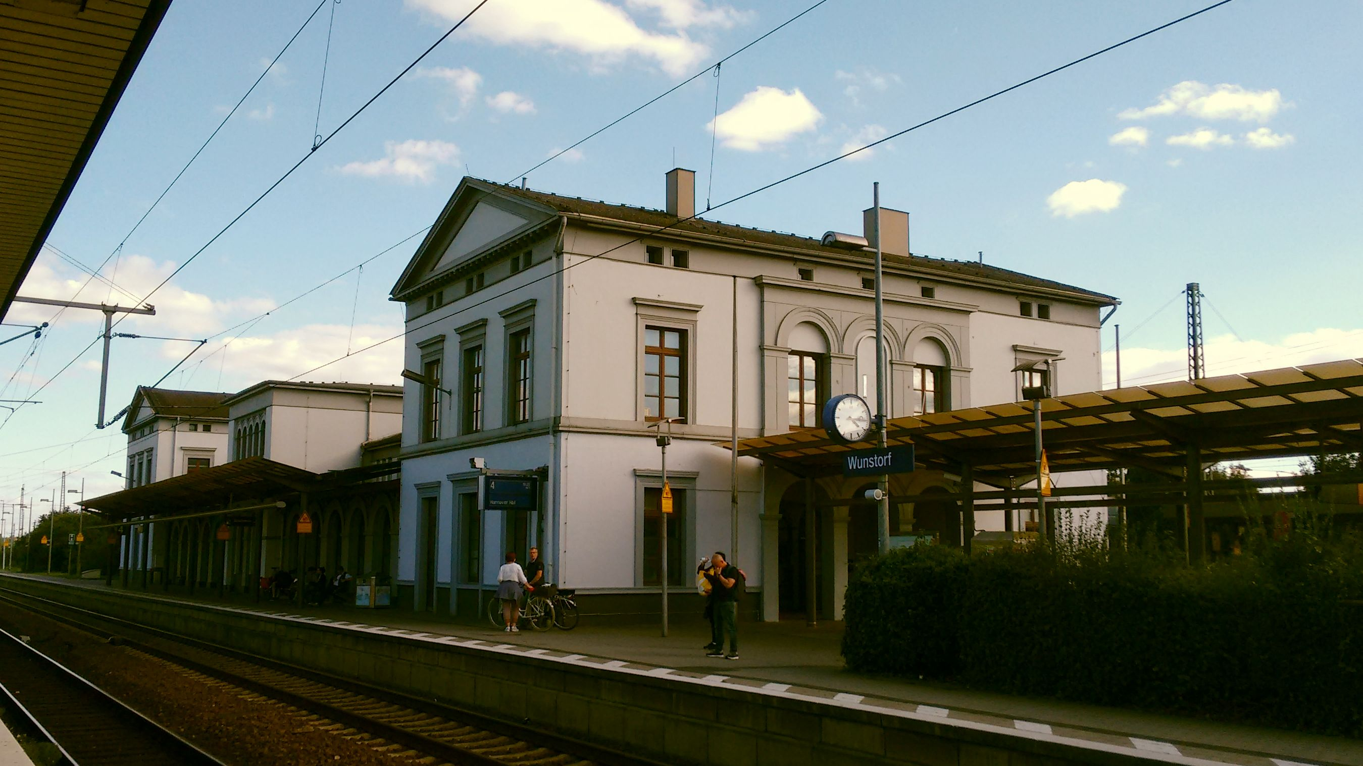 Bahnhof Wunstorf